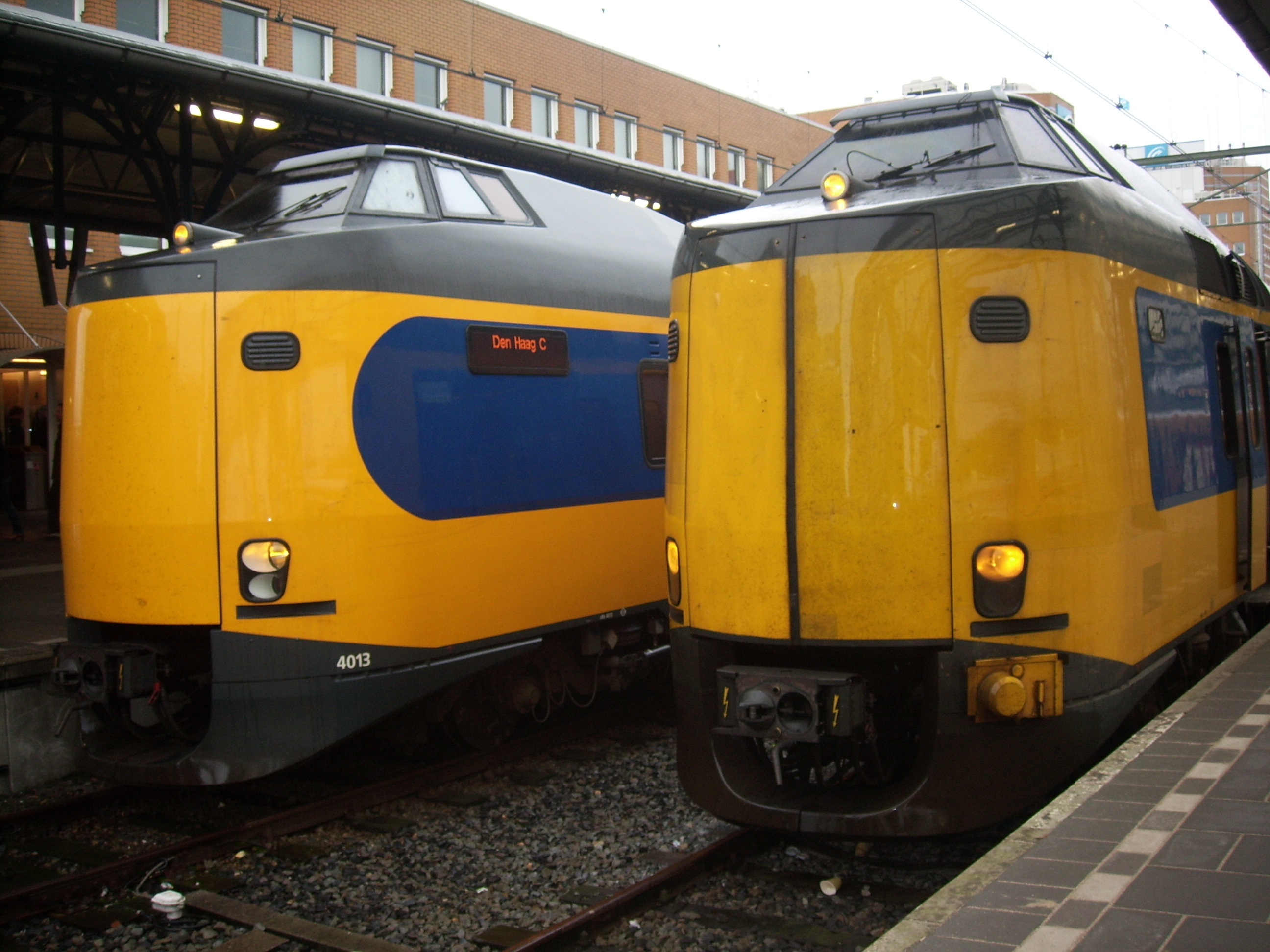 ICM en ICMm (4013) in Groningen